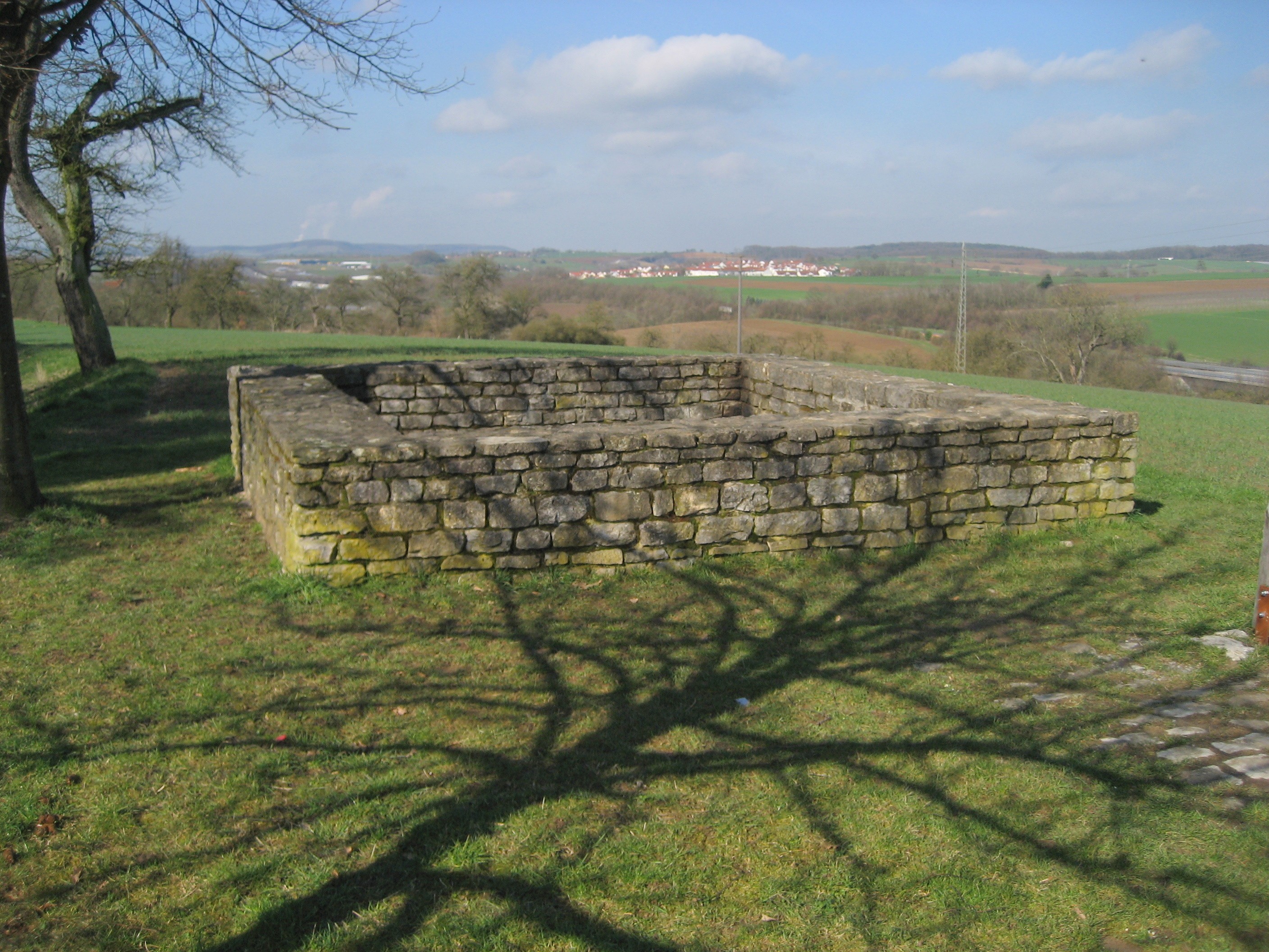 Öhringen Limeswachturm, rekonstruierter Sockel des WP 9/33, Standort: wenige Meter südlich der Autobahn A 6